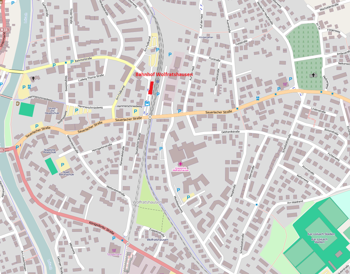 Umgebungskarte Bahnhof Wolfratshausen mit rot markiertem Bahnhofsgebäude This map may be incomplete, and may contain errors. Don't rely solely on it for navigation.